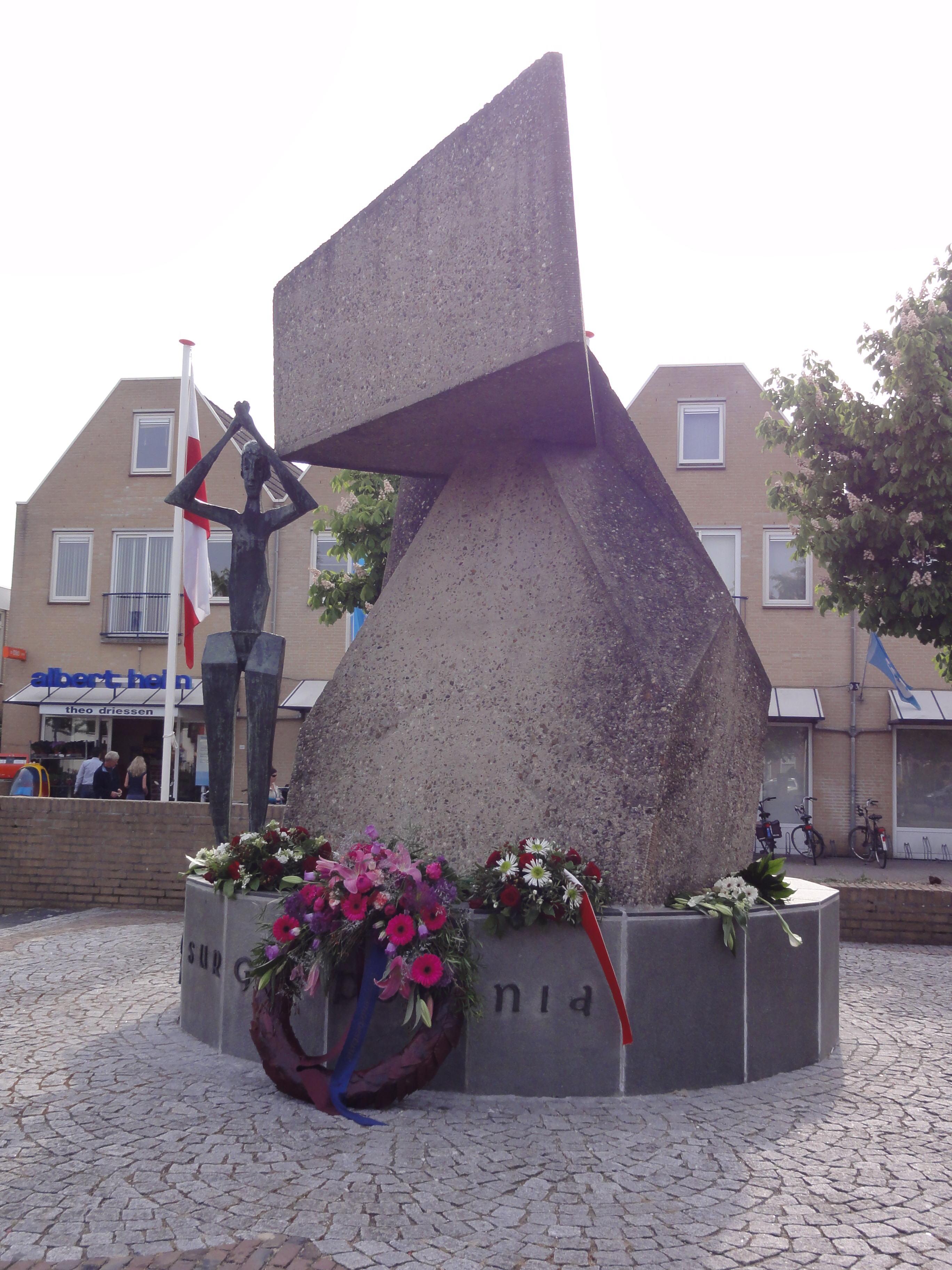 Driel (Overbetuwe) oorlogsmonument 1 op Polenplein (sculptuur) van rechts voor.